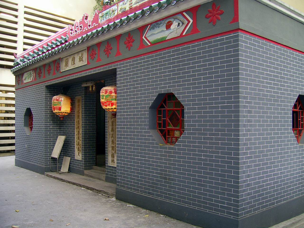 中文（香港）: 筲箕灣城隍廟